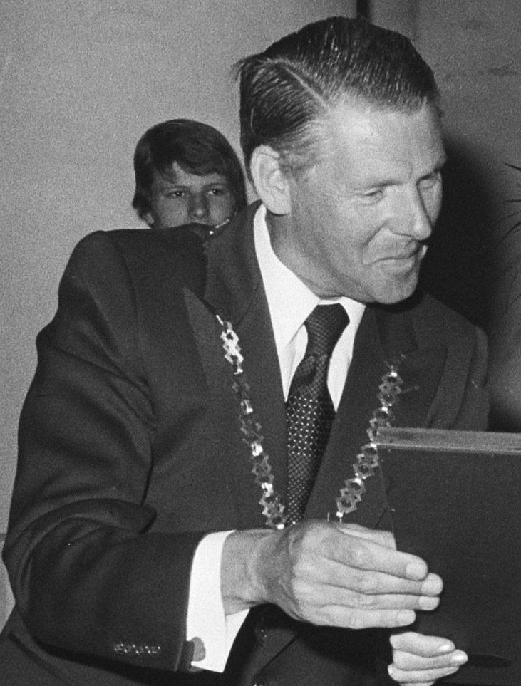 Prinses Beatrix en prins Claus bezoeken Middelbeers in Noord-Brabant